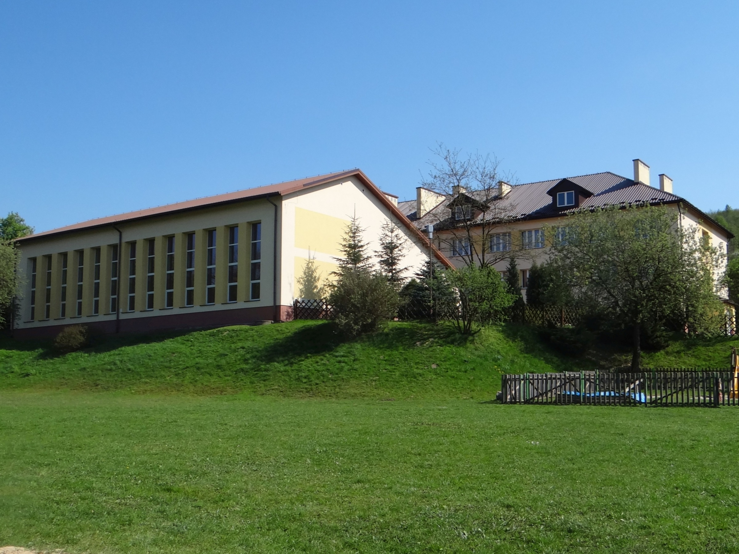 Szkoła w Szczepanowicach